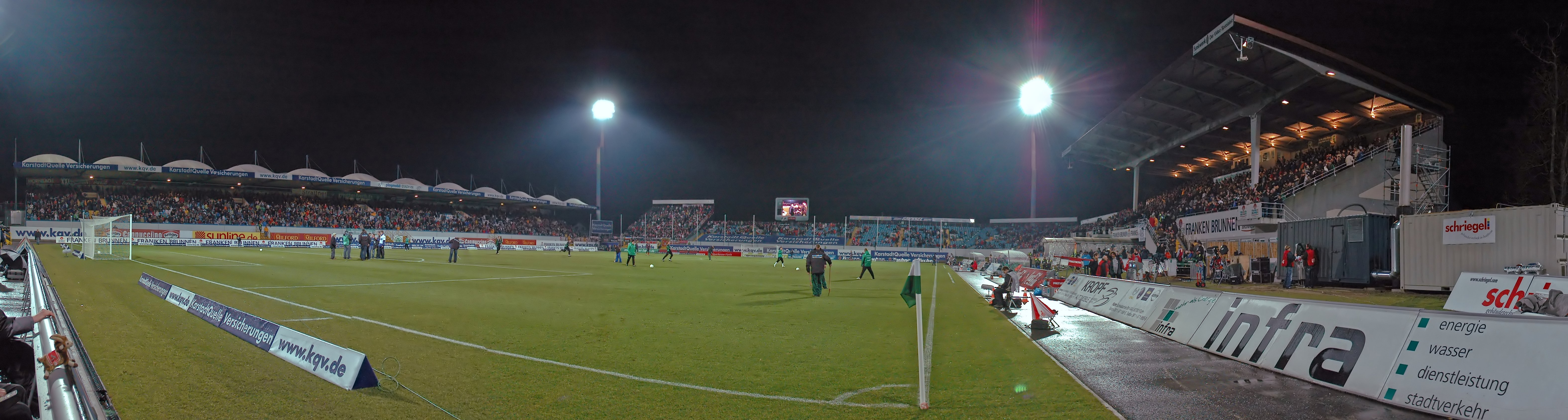 Panorama des Playmobilstadions (seit 2010 Trolli Arena) in Fürth